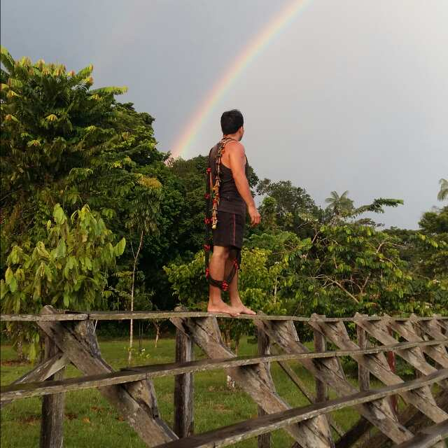 Essa foto foi tirada na Aldeia Ipiranga dos índios Puyanawa. Eu estava fazendo meu trabalho de campo para minha monografia e estava entrevistando o pajé. Logo após uma pequena chuva formou-se esse maravilhoso Arco-íris.